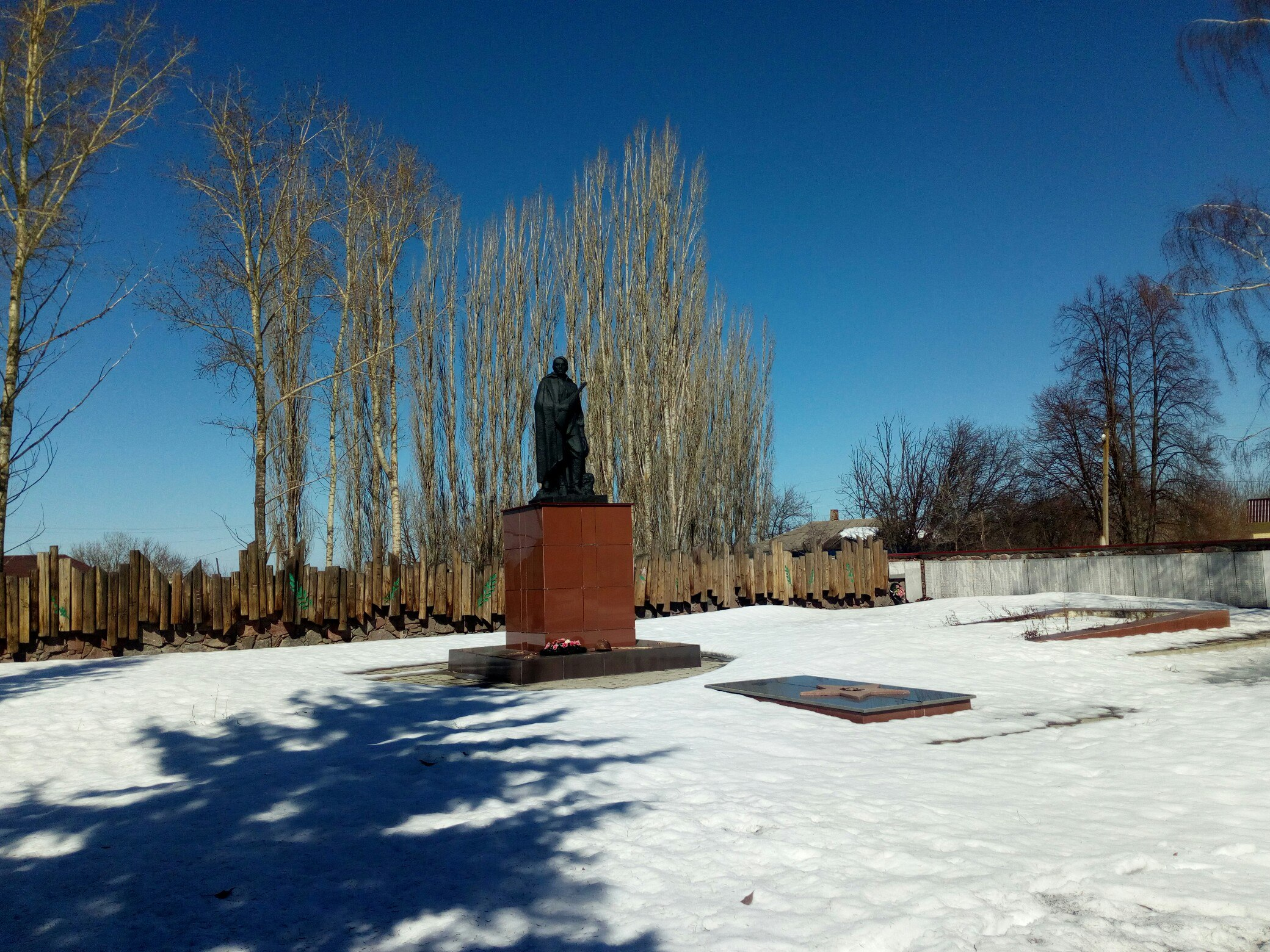 Мемориал «Память» который воздвигнут на месте братской могилы № 305 и посвящён освободителям села от вермахта в ВОВ. Село Кочетовка, Хохольский район, Воронежская область, Россия.